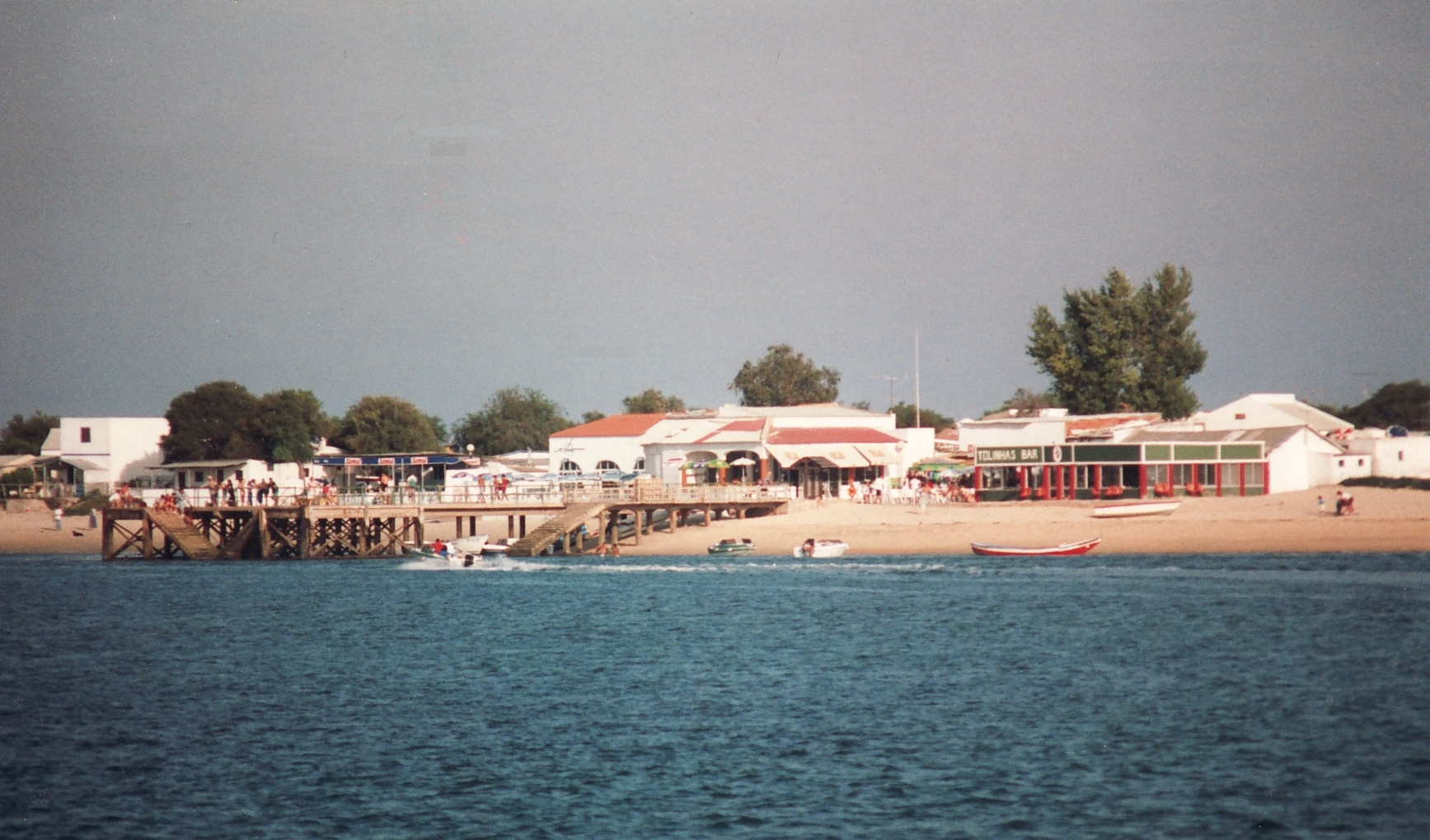 Portugal - Algarve: Ilha da Armona vor Olhão, Landungsbrücke und Gastronomie